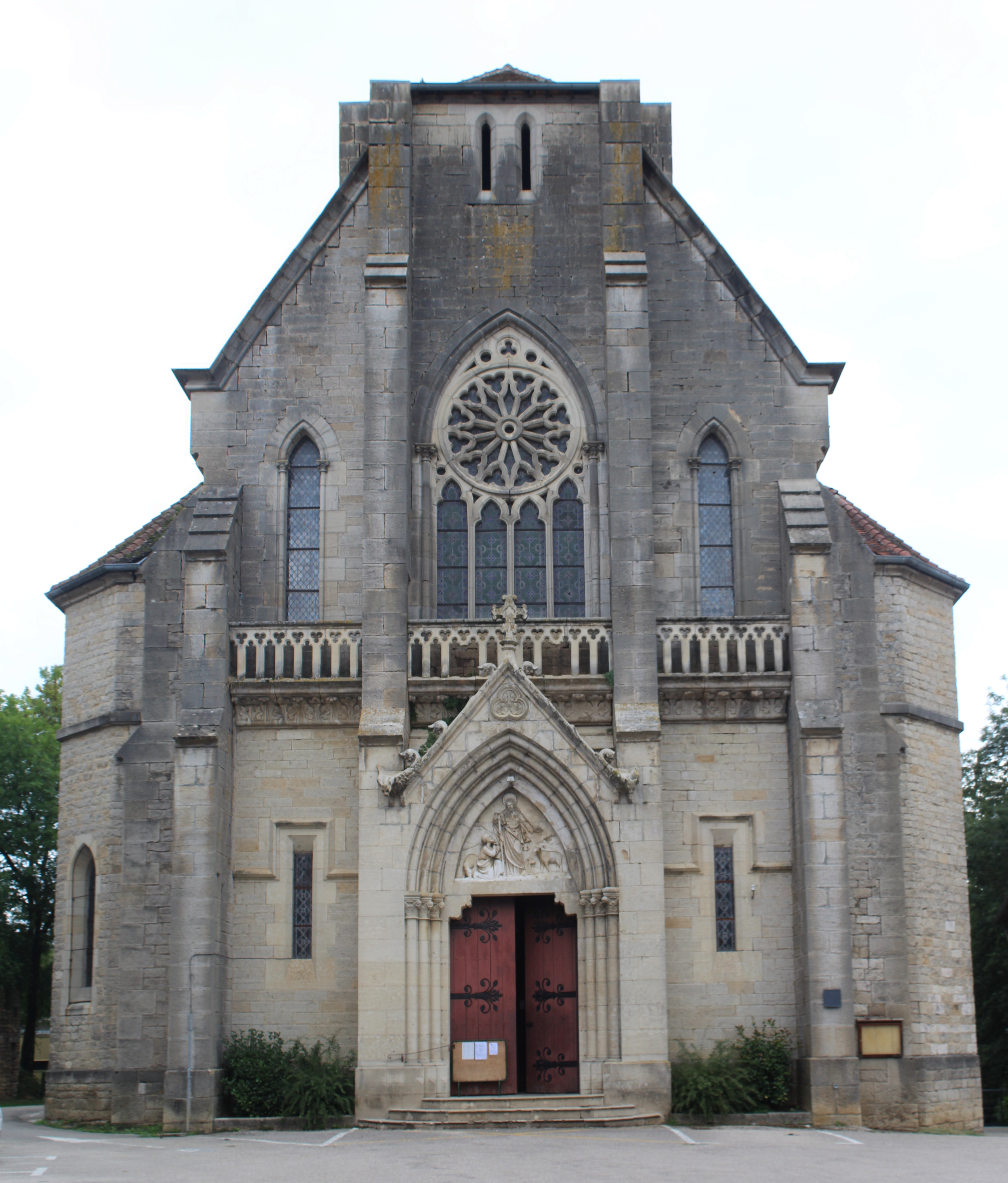 Église Saint-Pierre de Sellières.